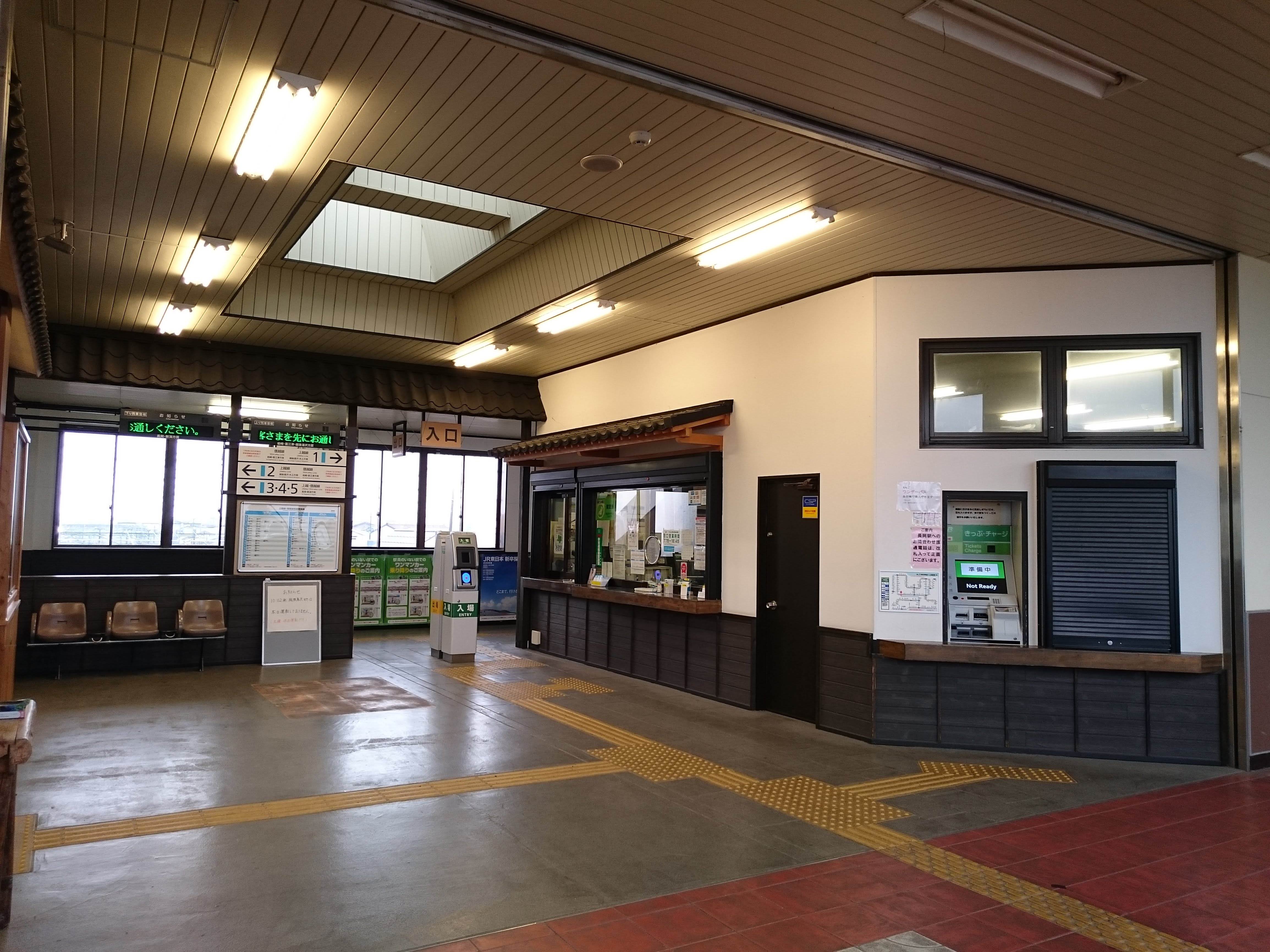 宮内駅のコンコース（リニューアル後）